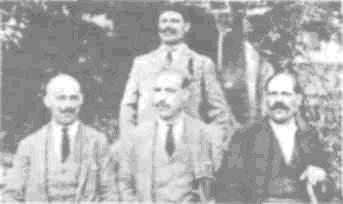 Dafo Danailov (left), Trayan Lakavishki (behind)